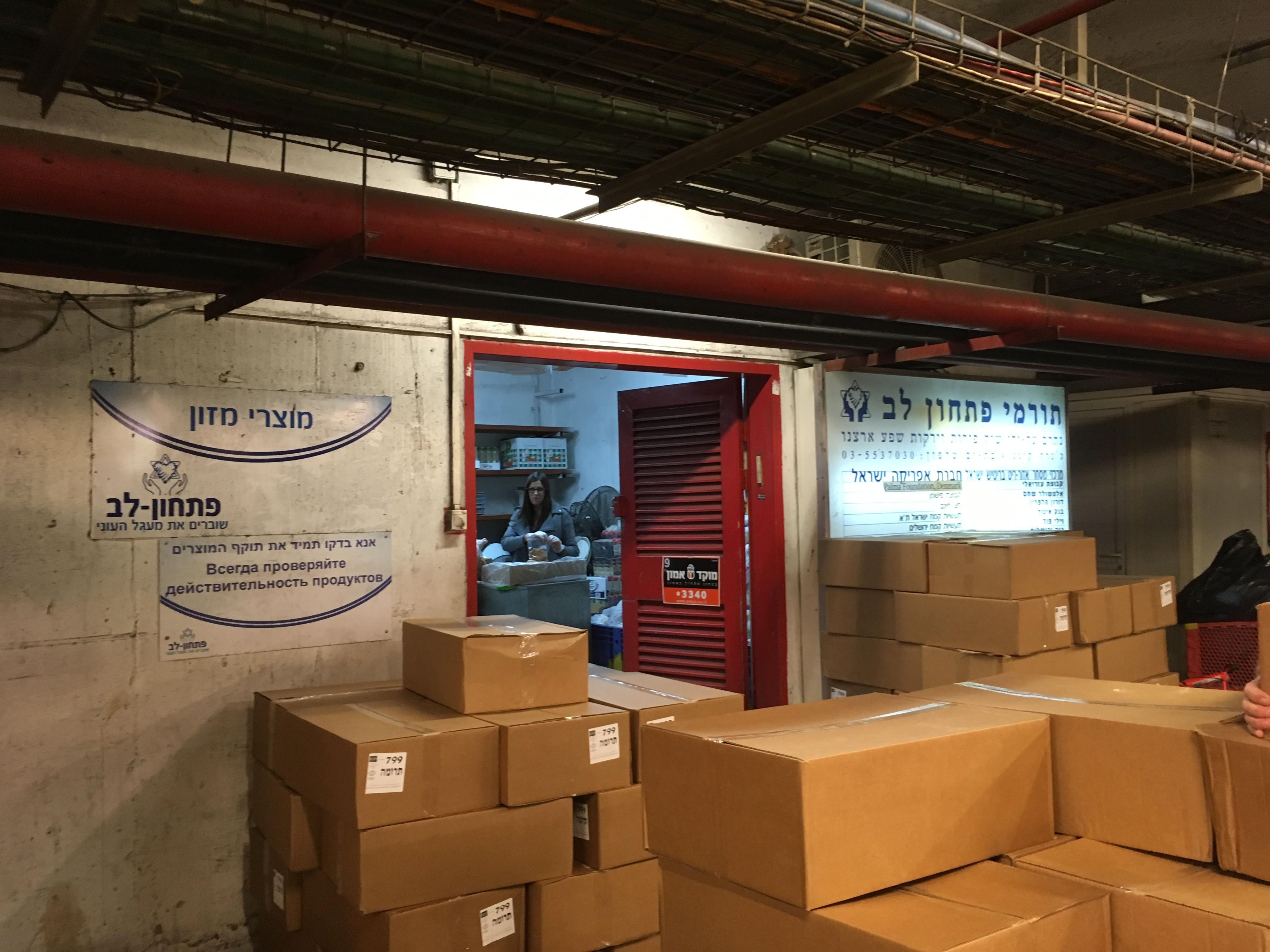 פתחון לב ראשון לציון